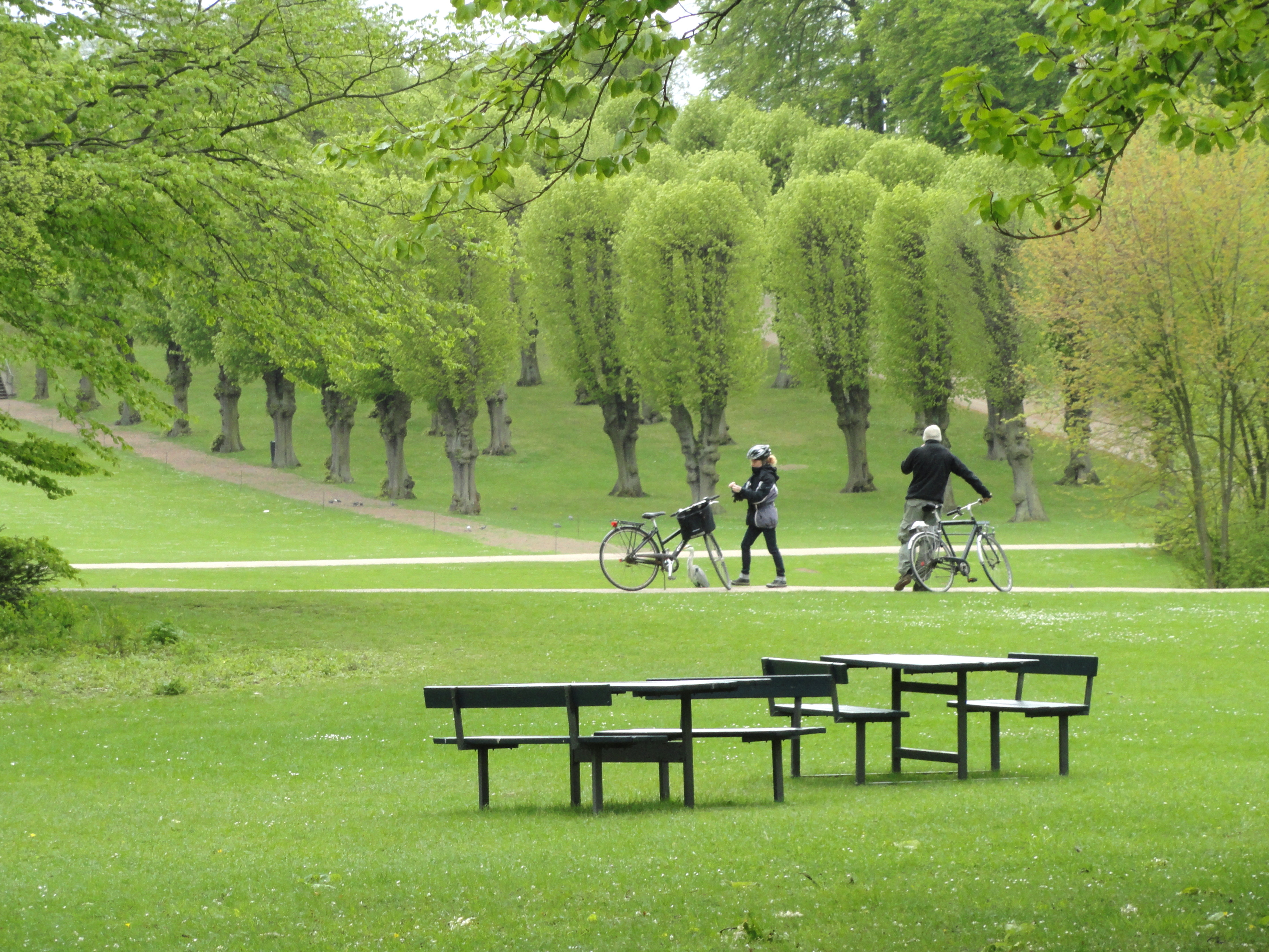 Frederiksberg Have, Frederiksberg, Copenhagen, Denmark.